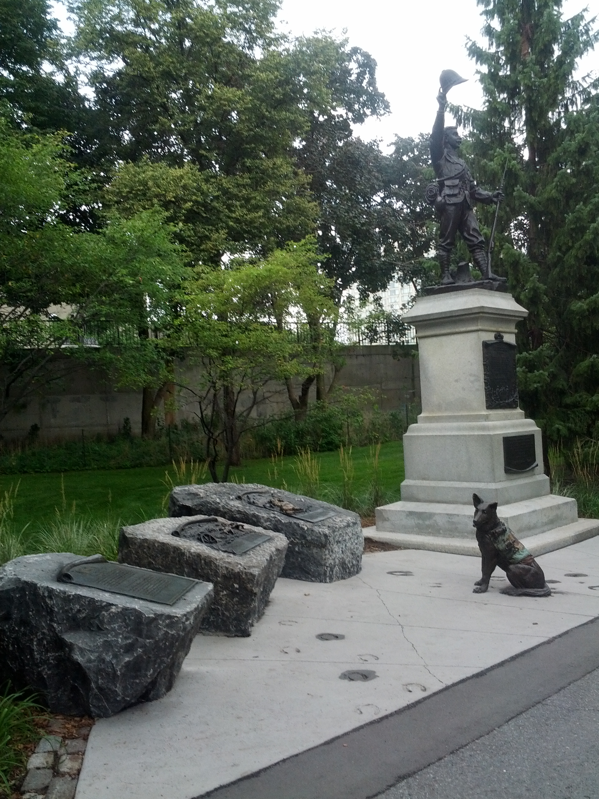 Placas em Ottawa, homenageando os animais que serviram em tempos de guerra.